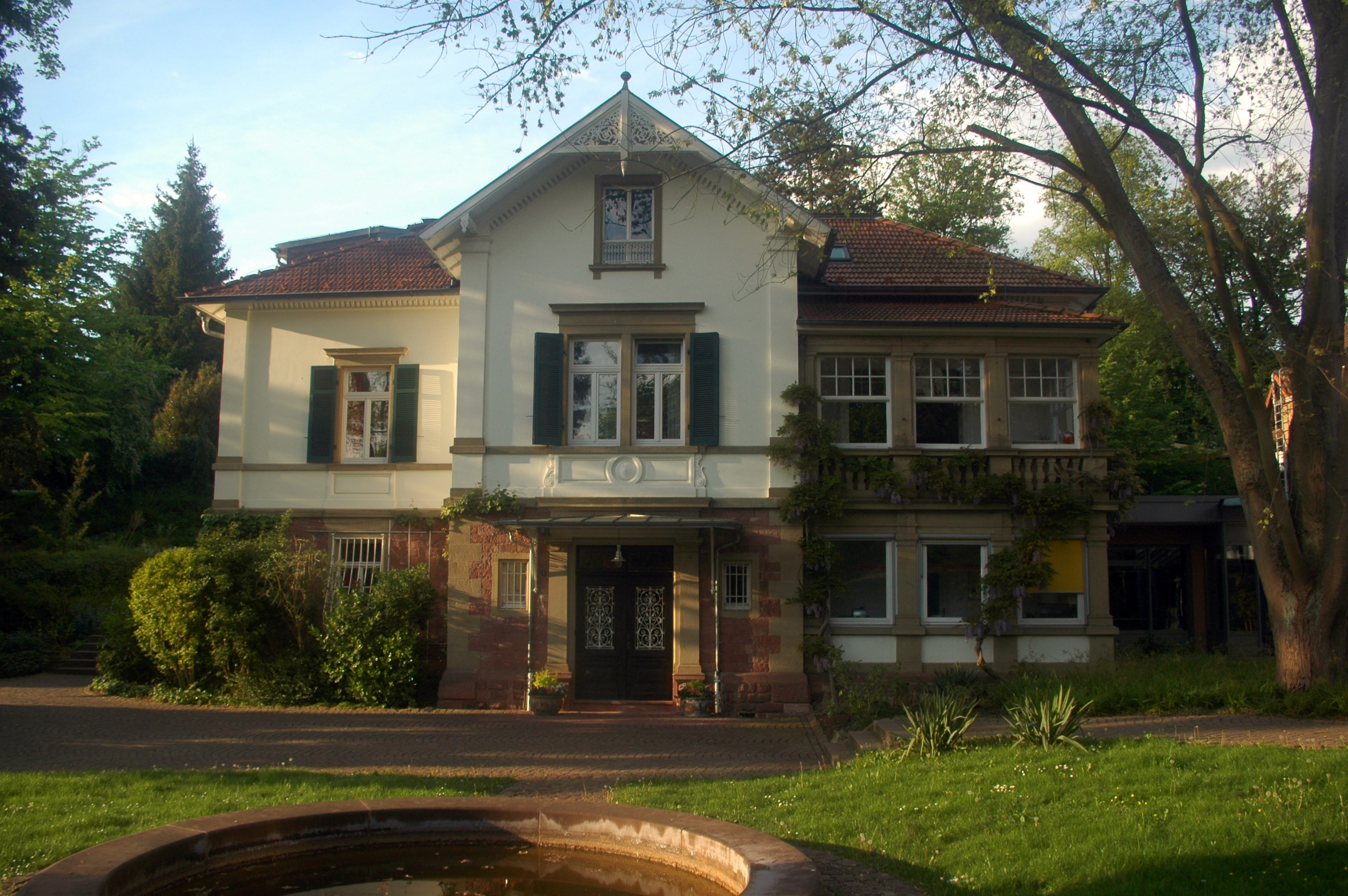 Kurpfalzinternat in Bammental